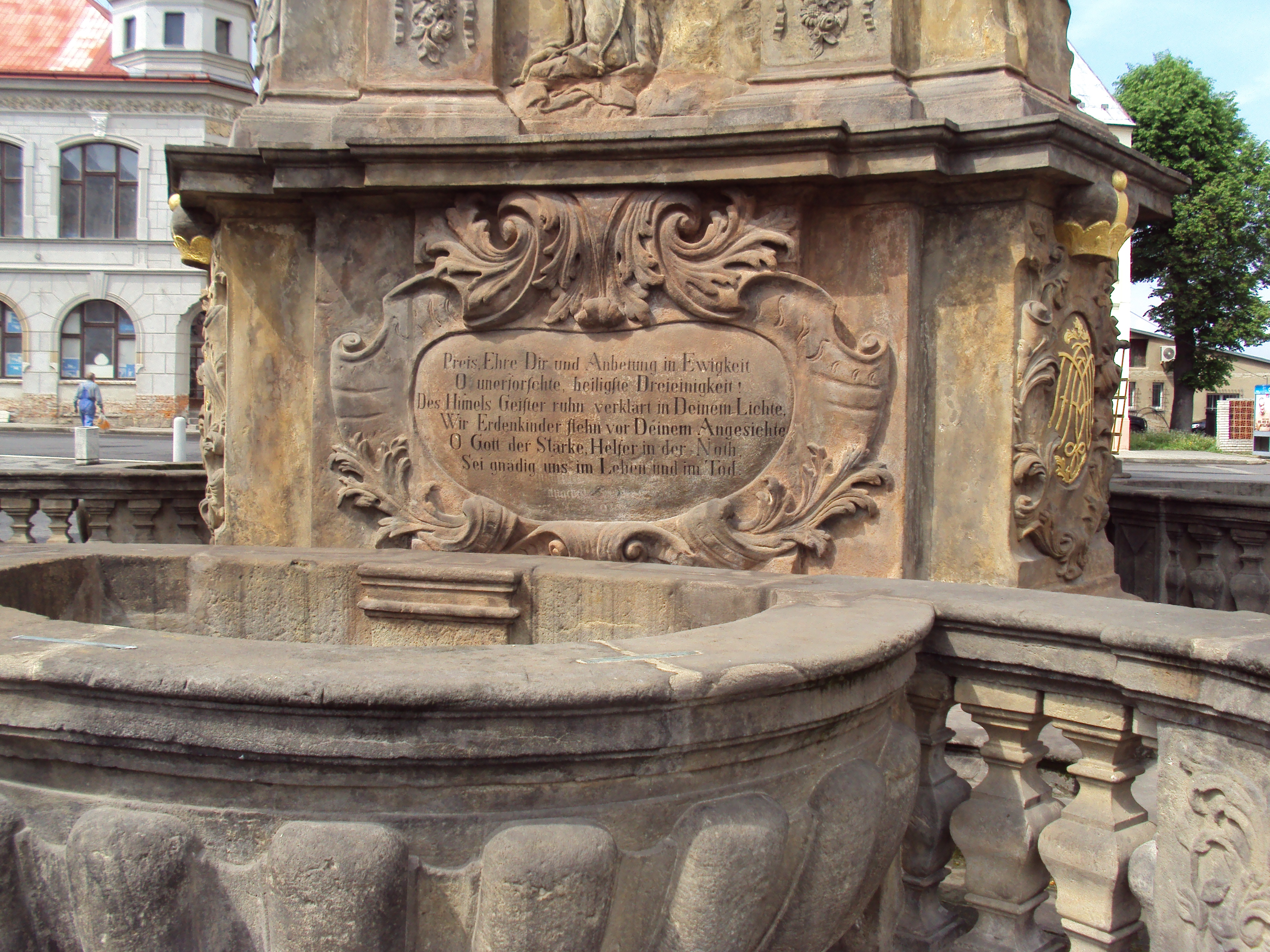 Spodní část morového sloupu